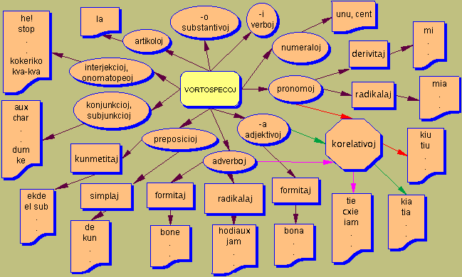 Cerbomapo pri Morfologio. Farita de Jinglada januare 2006